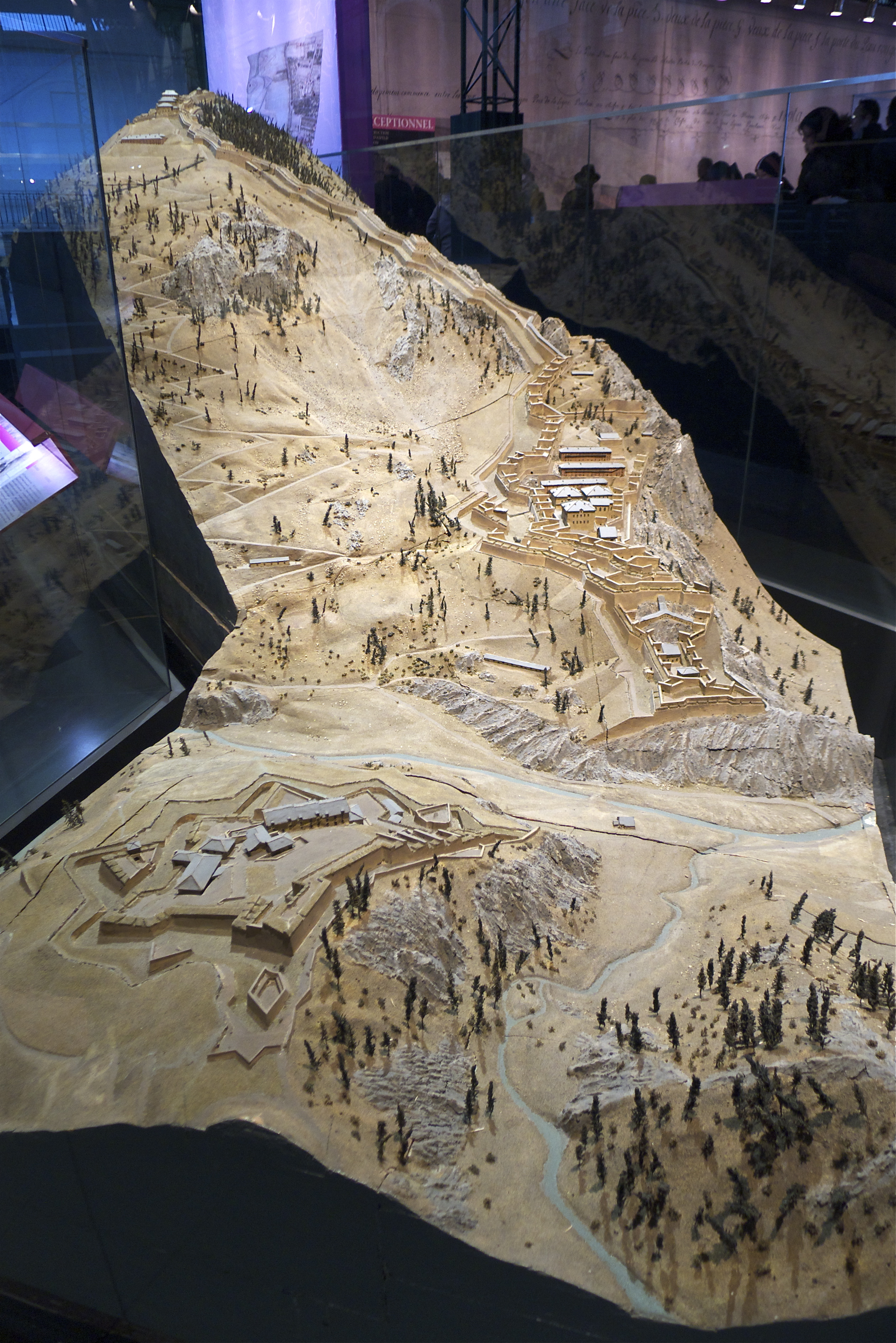 Plan-relief de la forteresse de Fenestrelle dans son état de 1757. Plan-relief construit en 1757 sous la direction de l'ingénieur Marciot. Échelle 1/600e